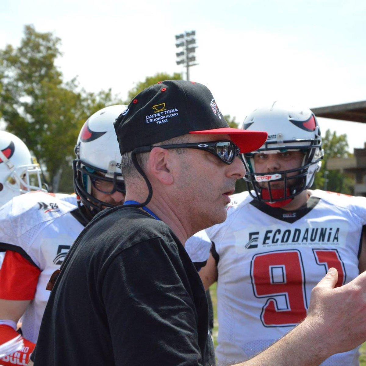 Ugo Calò spiega gli schemi